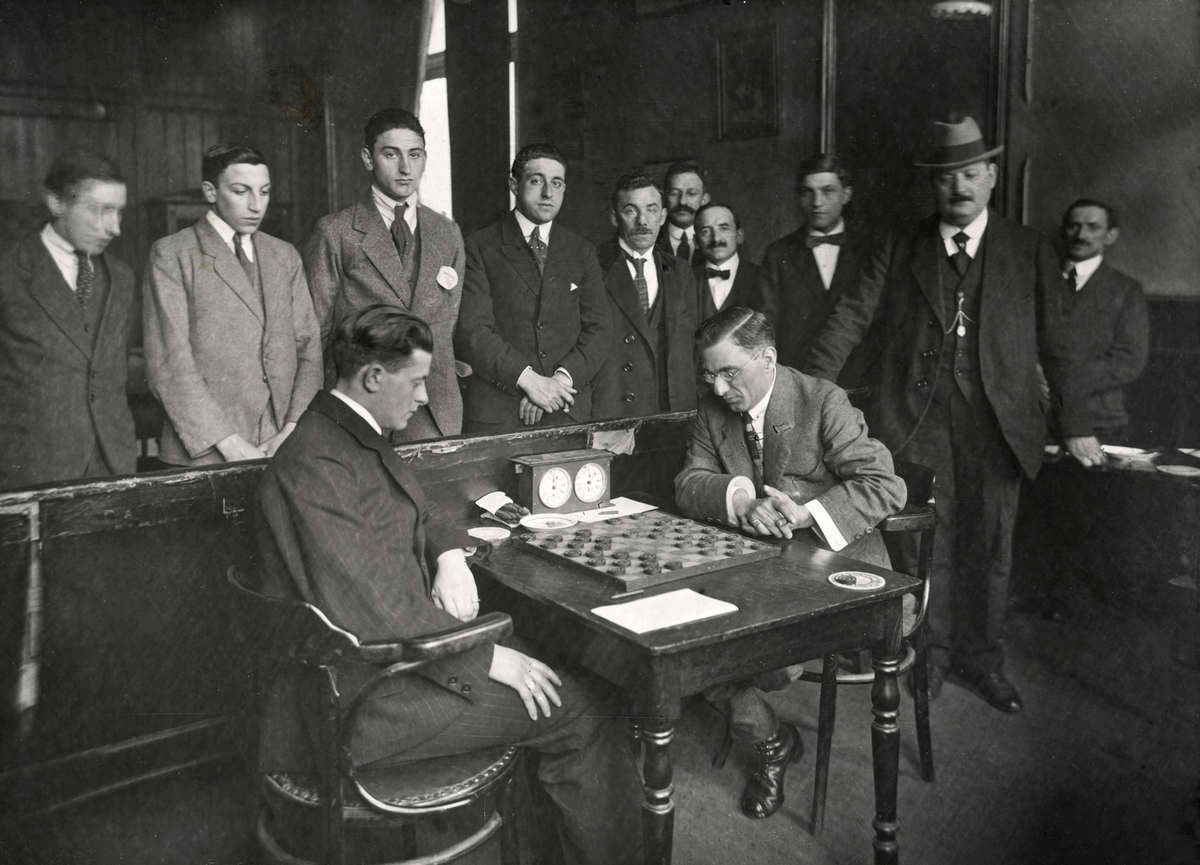 Dammen, Vierkamp tussen Marius Fabre, J.Swart, H.Koperberg, en L.Prijs. Foto de partij tussen L.Prijs en H.Koperberg in de dam-vereniging "Van Embden" te Amsterdam 1920.